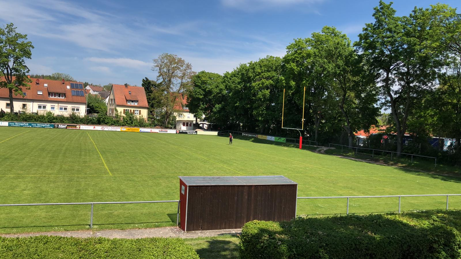 Sportplatz des ASV Herzogenaurach. Für American Football "Rhinos Field" genannt